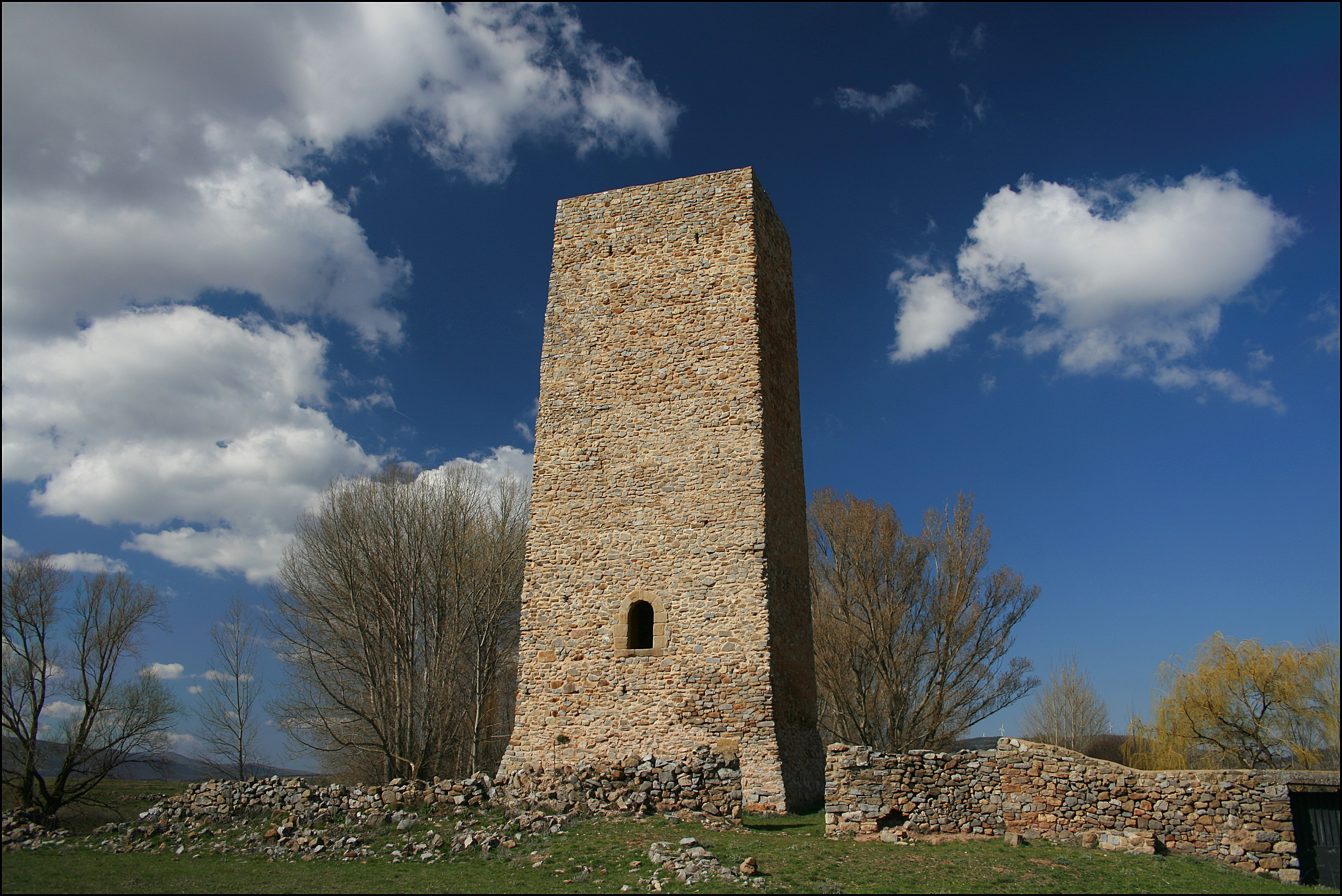 El torreón de Masegoso se encuentra junto a una iglesia de estilo gótico en el llamado despoblado de Masegoso, en el término municipal de Pozalmuro, provincia de Soria.